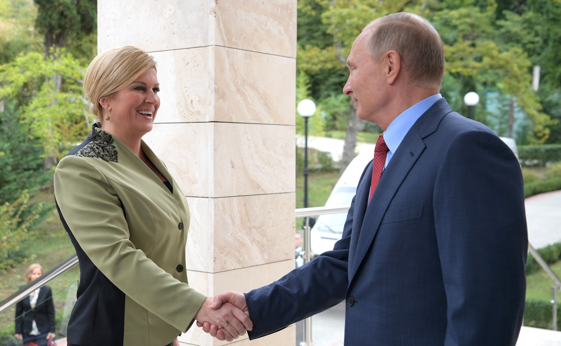 Встреча Президента России Владимира Путина с Президентом Республики Хорватии Колиндой Грабар-Китарович